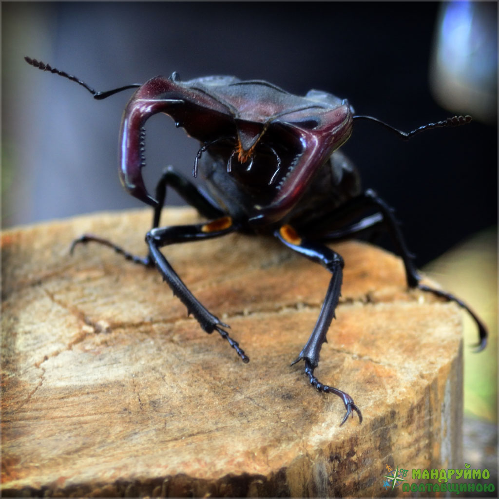 фотографії зроблені під час велоекскурсії, яку організувала ГО "ВелоПолтава" спільно з ПМЕГО «МАМА-86-Полтава»